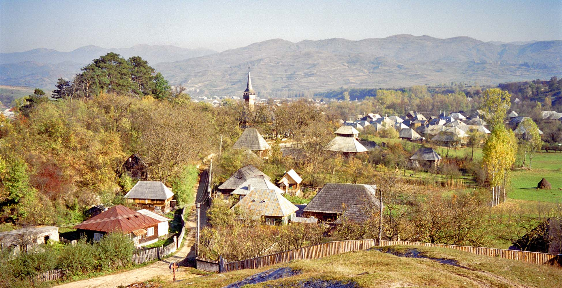 Ieud Deal, biserica bătrână și casele dimprejur, vedere de pe Pravăț.